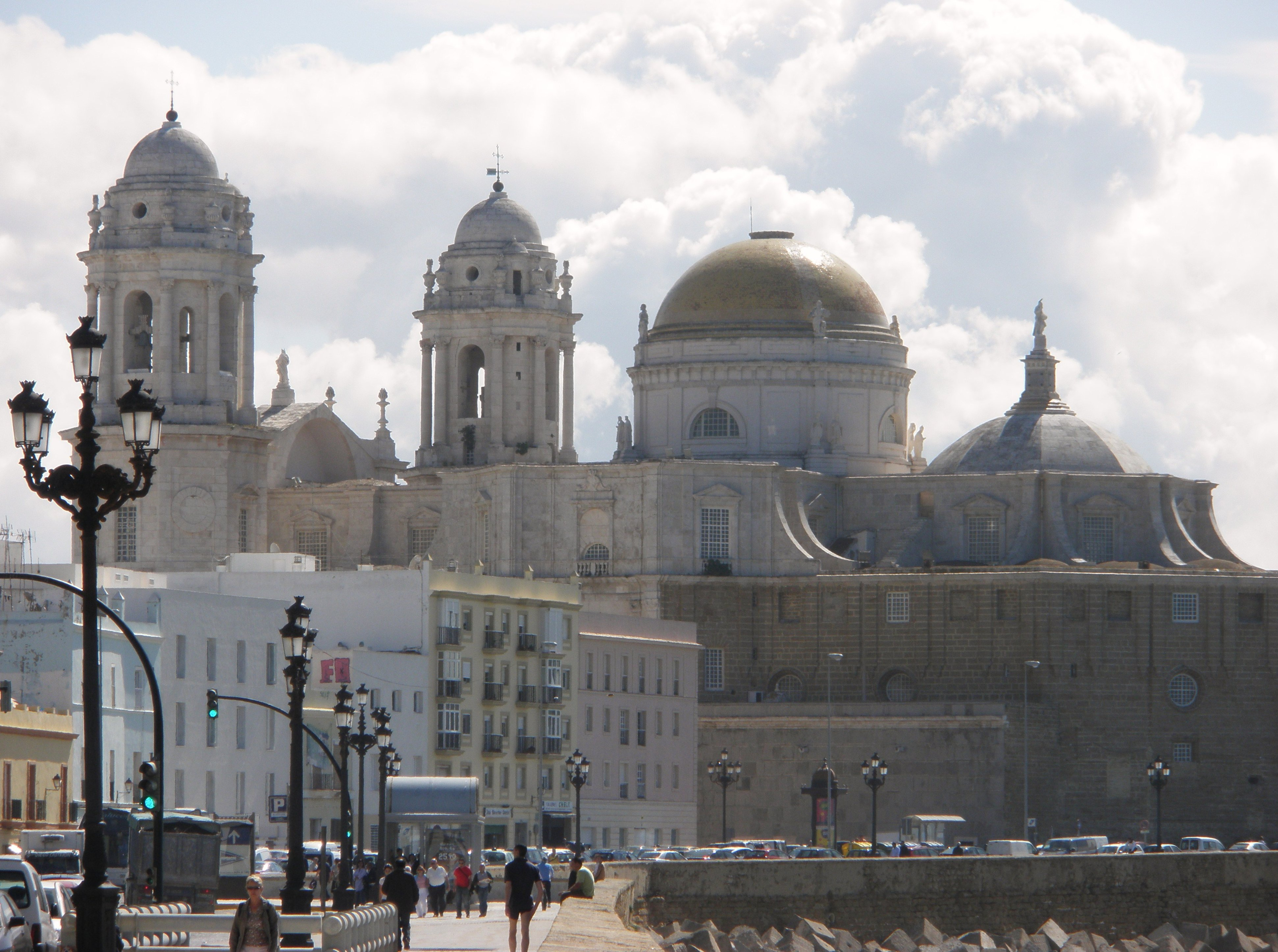 Catedral de Cádiz, España